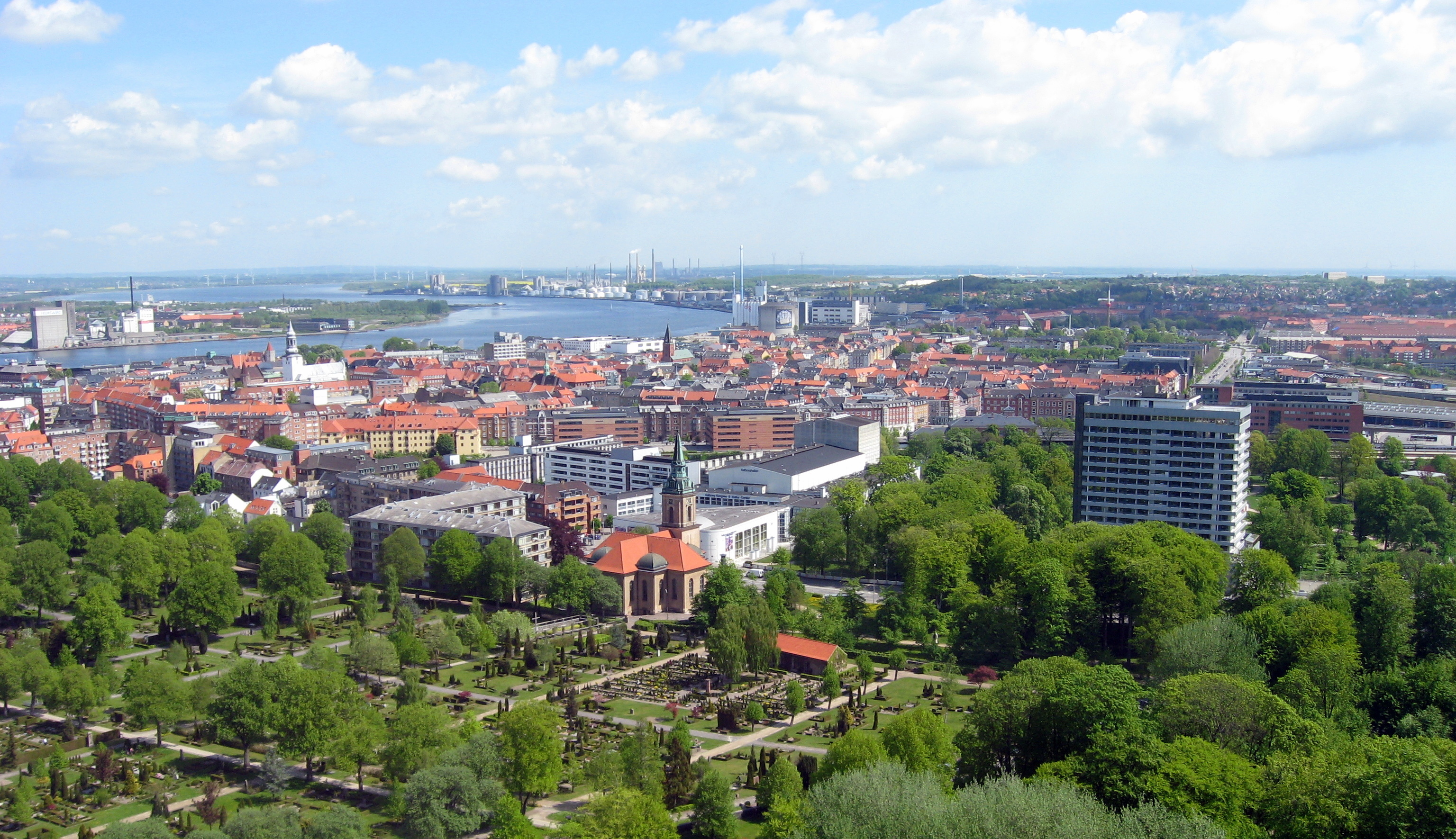 Aalborg